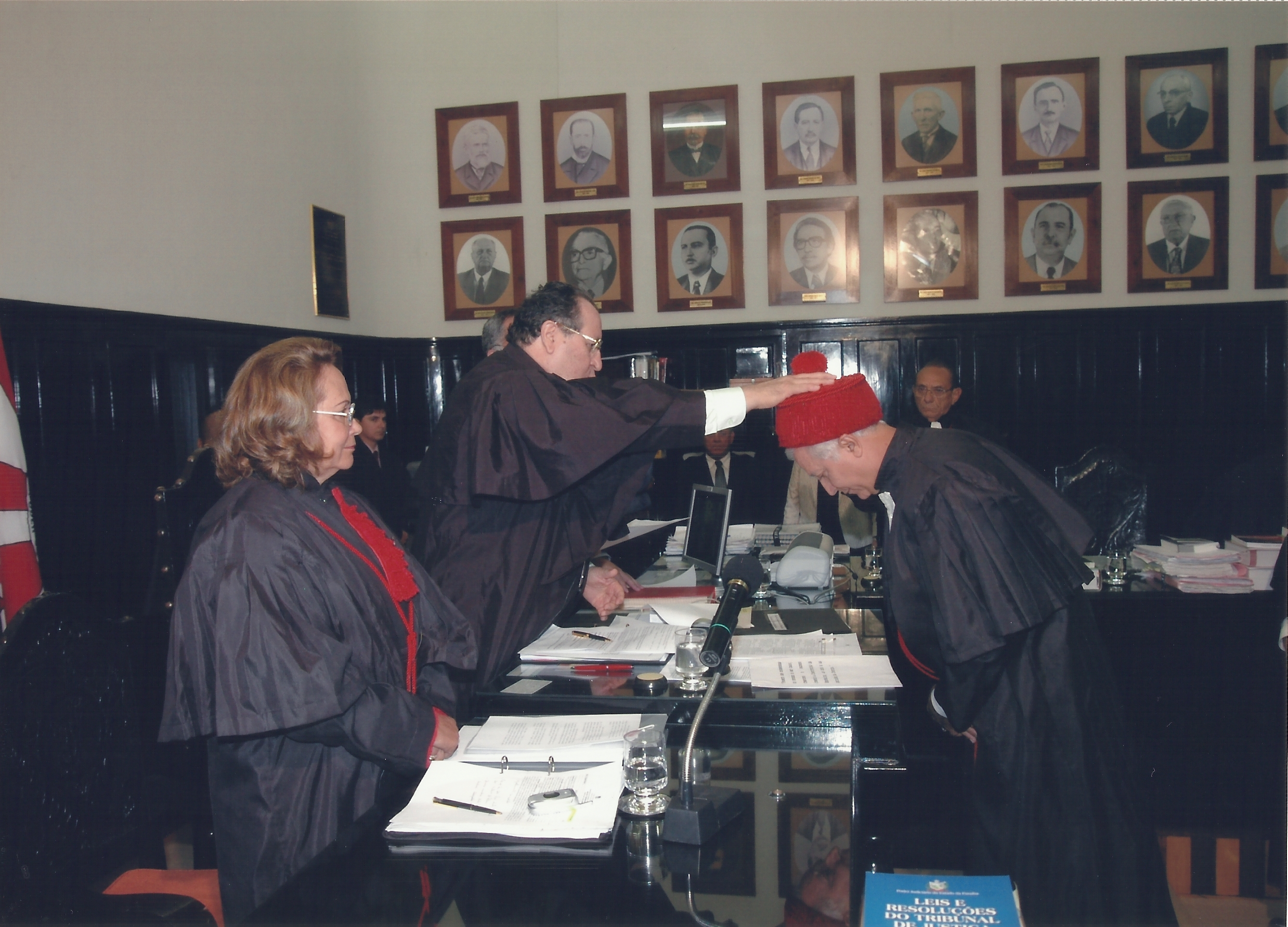 Posse como Desembargador, no TJPB